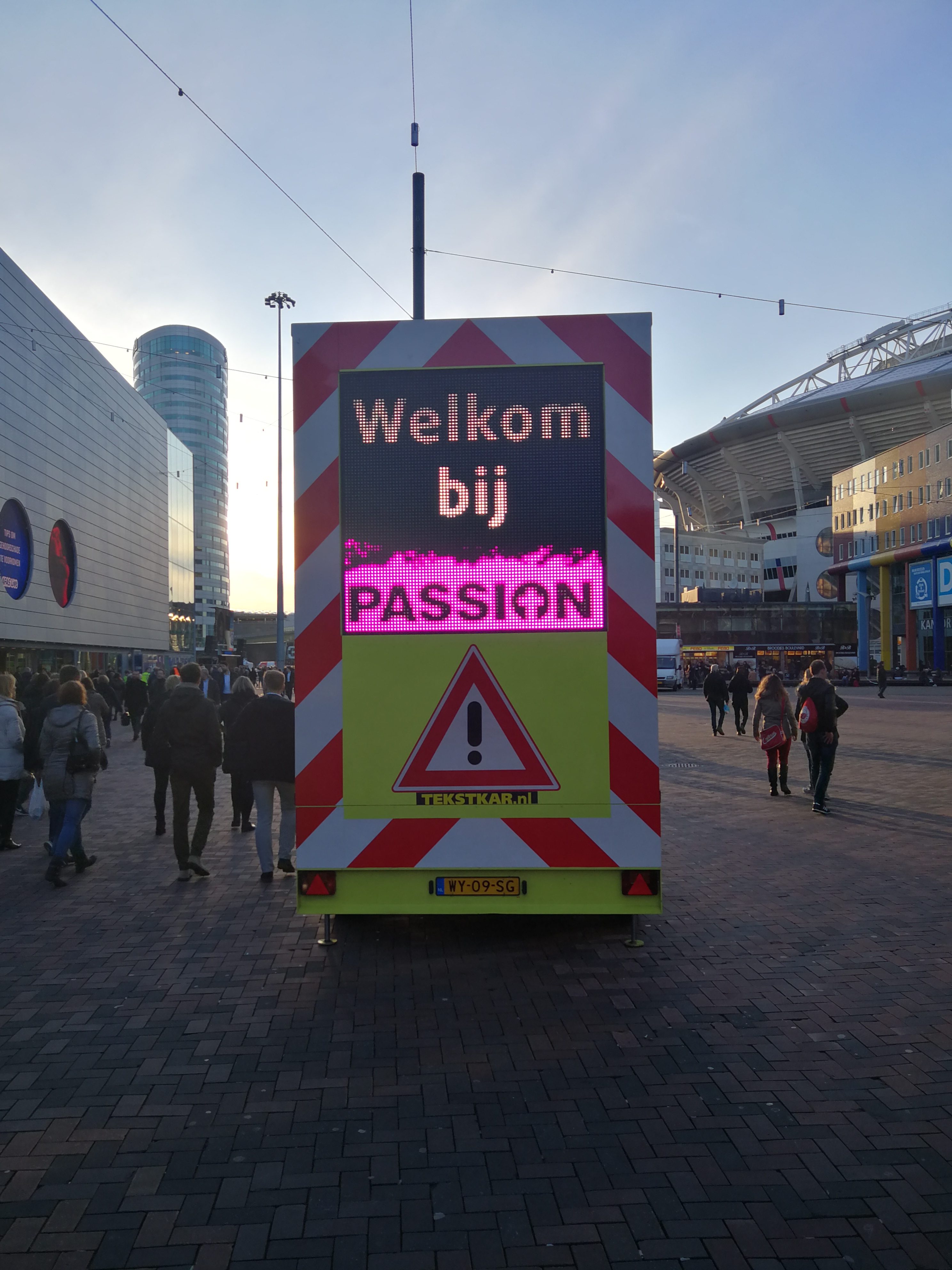 Welkomstbord van The Passion 2018 op het Arena Park in Amsterdam-Zuidoost.